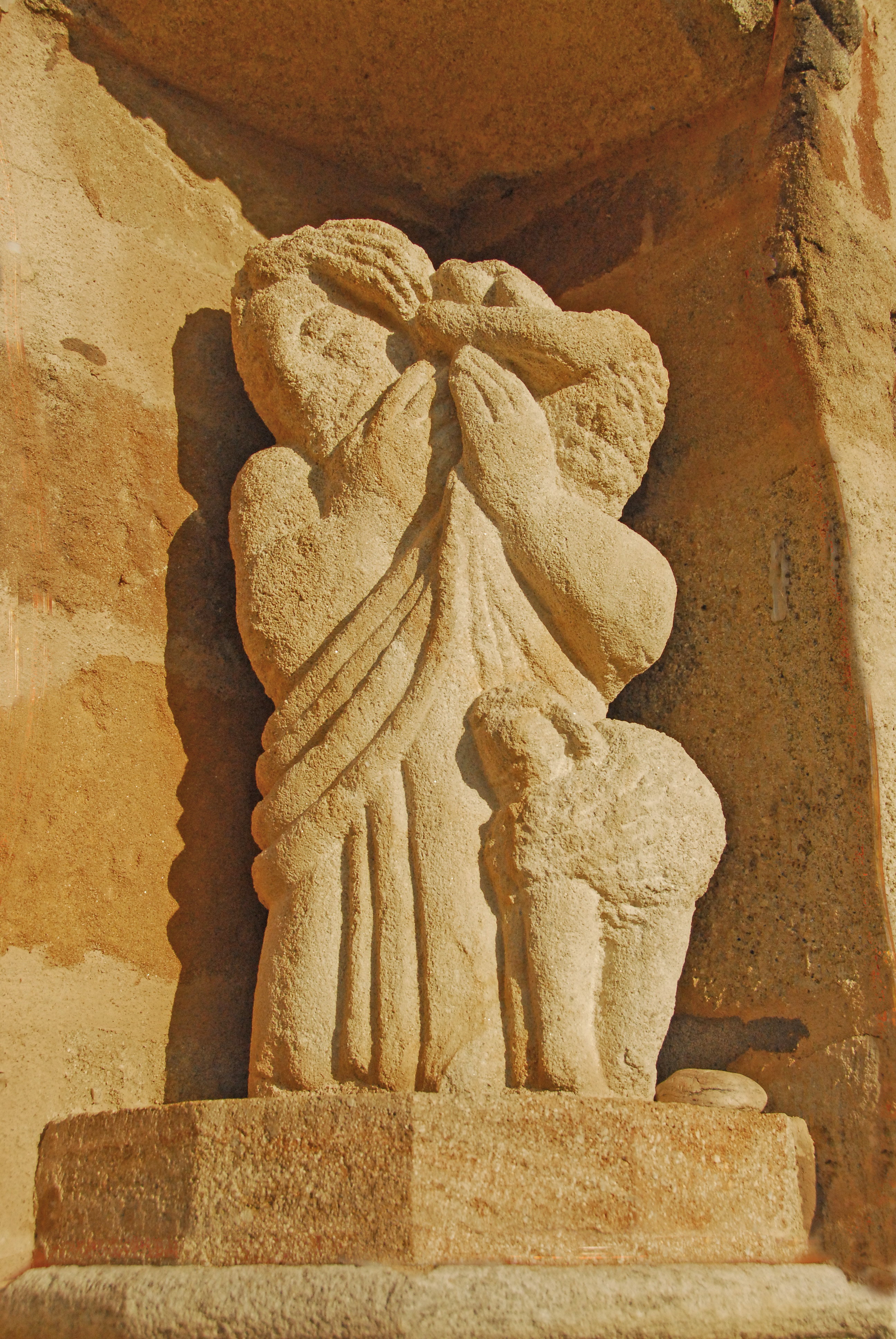 St.-Jean Glaine-Montaigut, Skulptur, Frau mit 2 Schafen